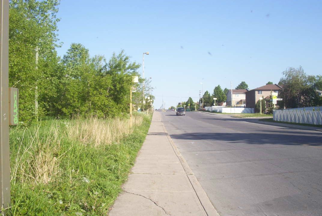 Une photo de Montréal, en Rivière-des-Prairies. Je l'ai créé moi-même.